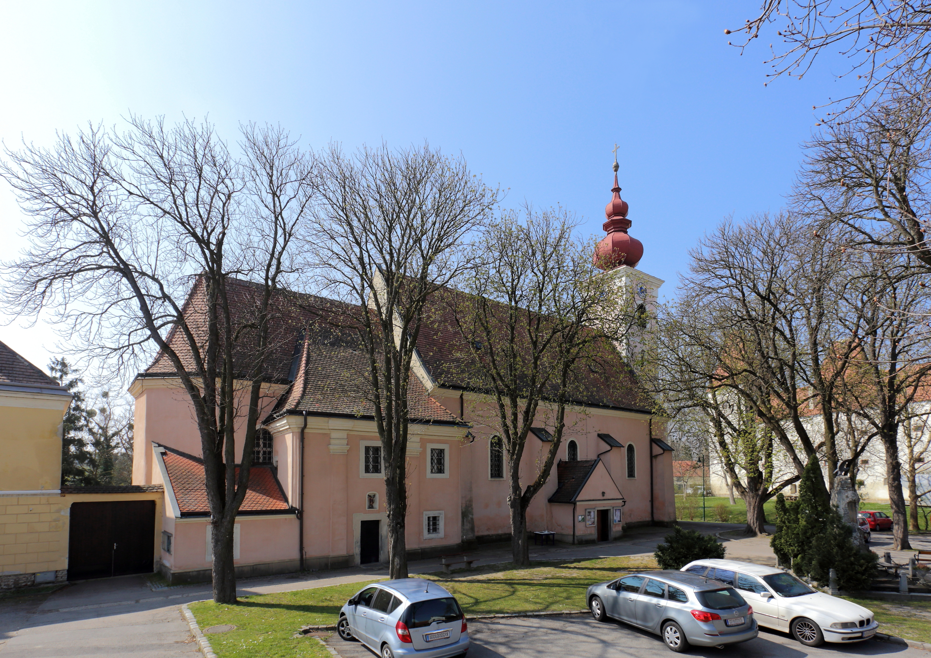 Pfarrkirche hl. Michael in der niederösterreichischen Marktgemeinde Orth an der Donau. Eine ehemalige Wehrkirche. Nach schweren Schäden durch den Türkenkrieg 1529 wurde der mittelalterliche Bau neuerlich aufgebaut und 1689 unter Beibehaltung des spätgotischen Kernbaues barockisiert.